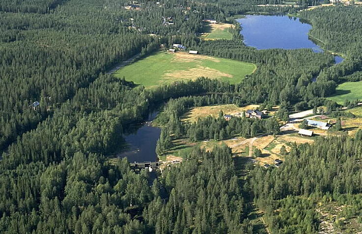 Motiv: Selet Nyckelord: Flygbilder, Riksintressen Kategori: Bruksmiljö.